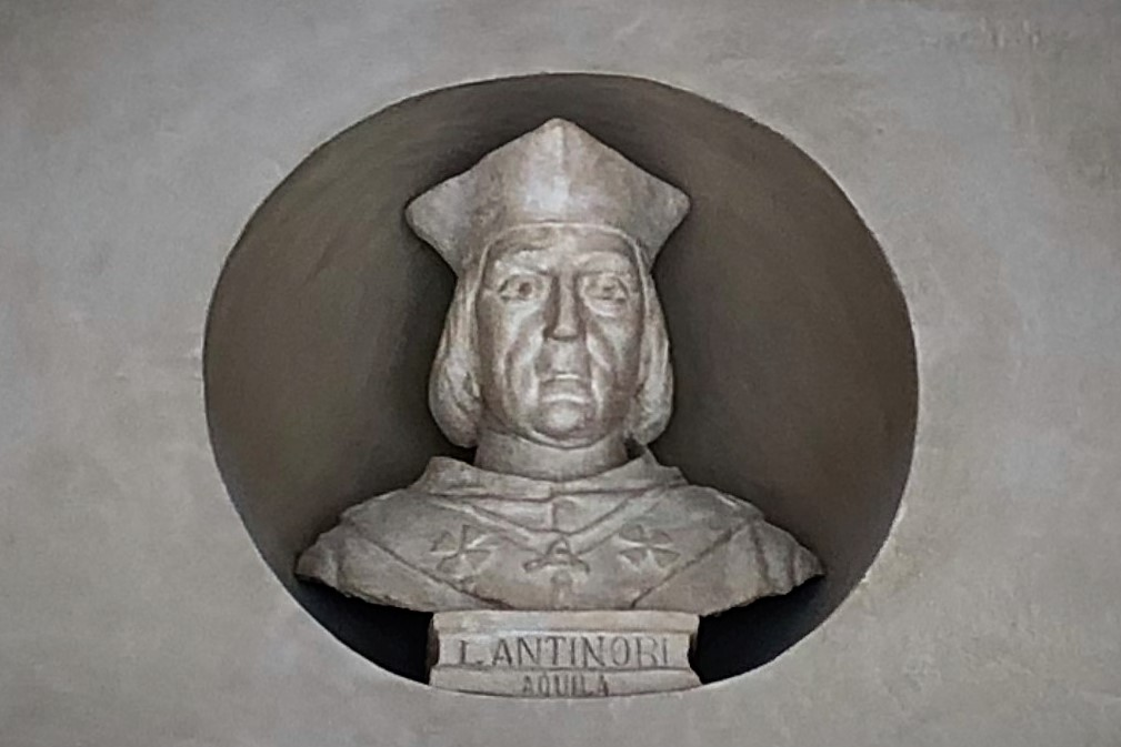 Il busto di Anton Ludovico Antinori nel colonnato del Palazzo dell'Emiciclo.